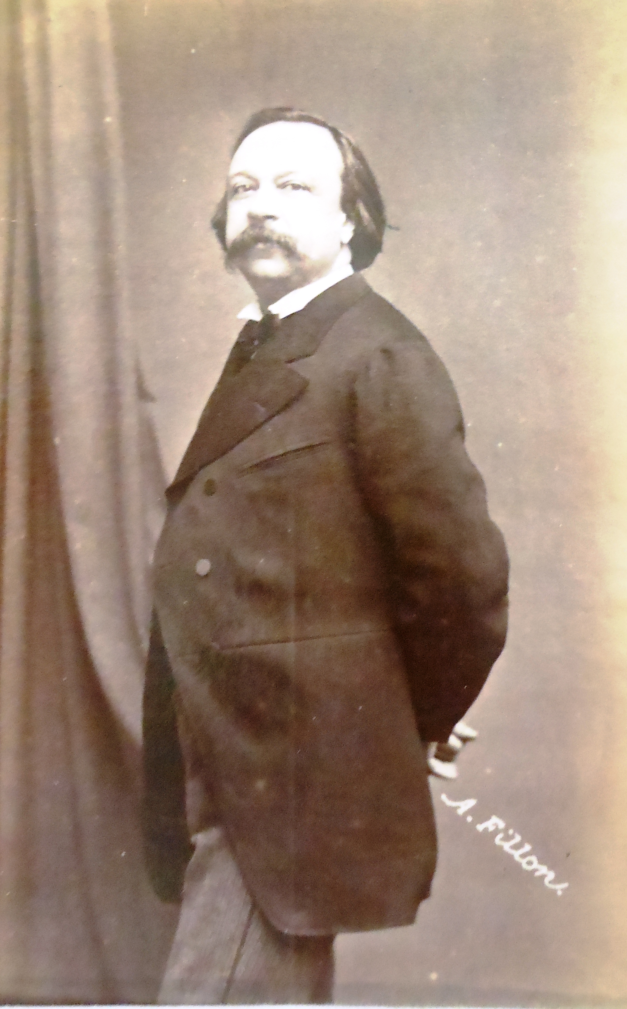 Escritor. Olisipógrafo